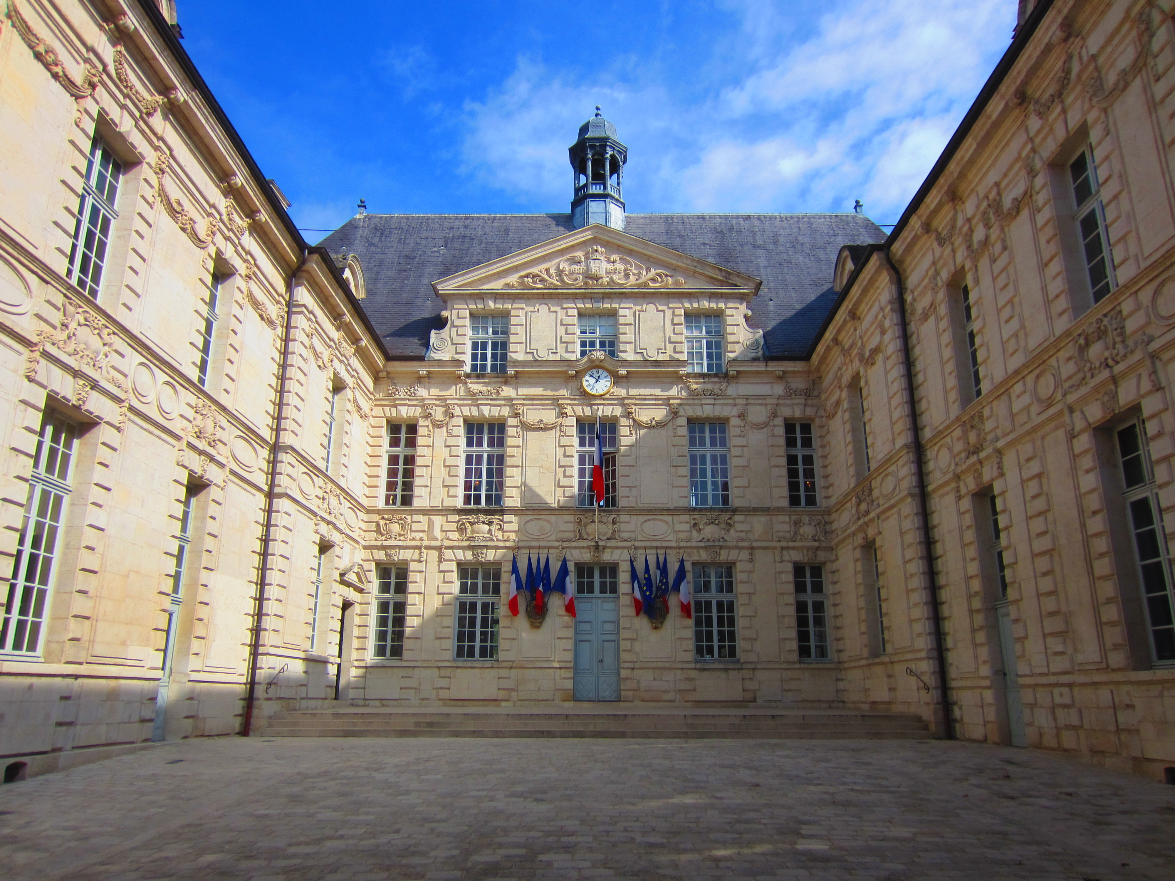 Mairie Verdun